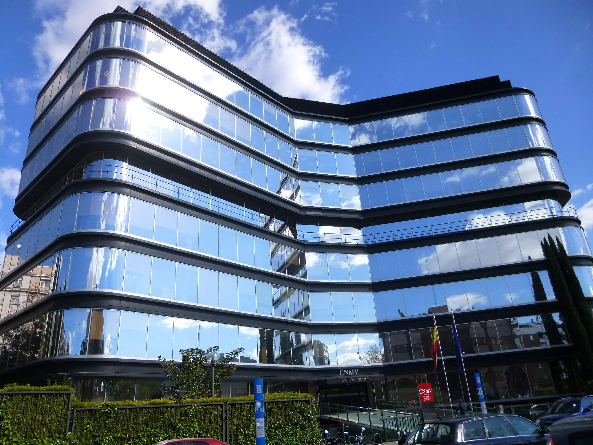 Madrid - Edificio Edison (sede de la Comisión Nacional del Mercado de Valores, CNMV)